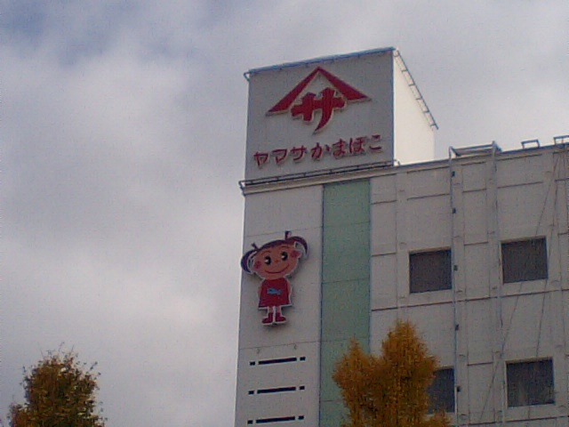 姫路市のヤマサ蒲鉾ビルに描かれている「さっちゃん」のキャラクター